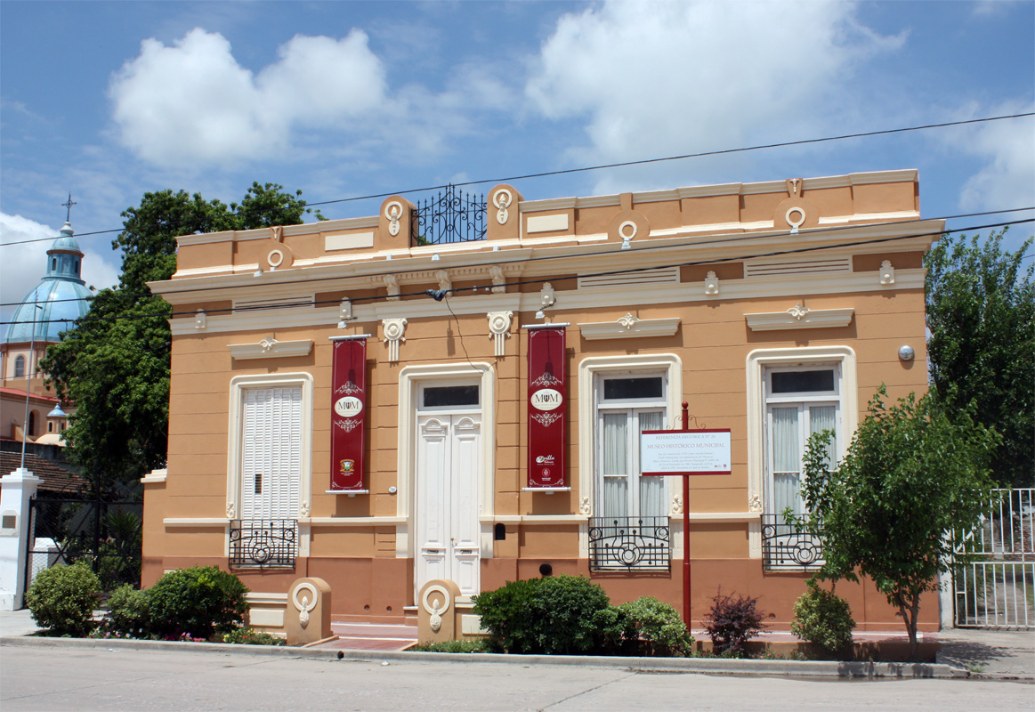 Museo Historico Municipal Villa del Rosario